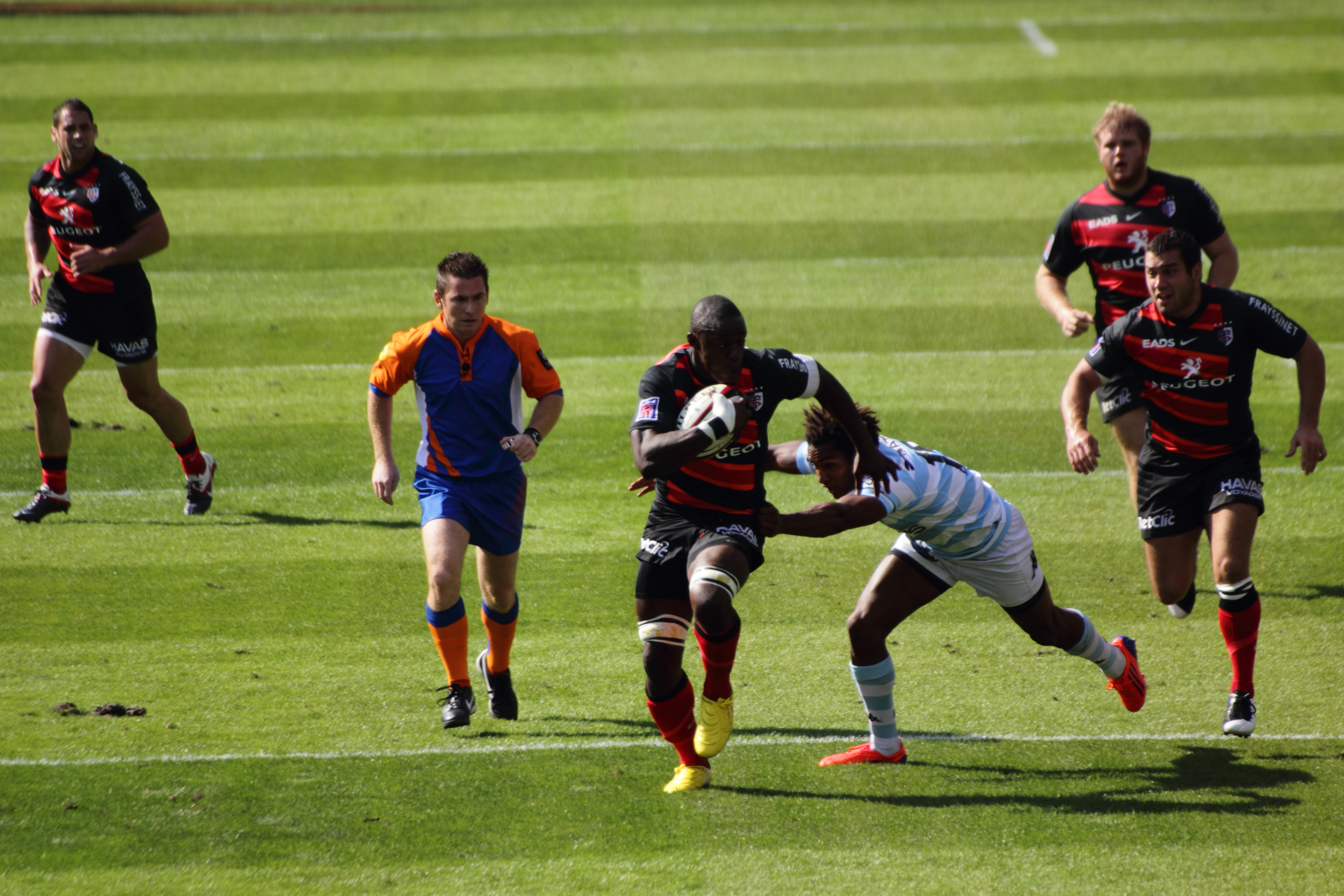 Yannick Nyanga évite le plaquage de Benjamin Fall